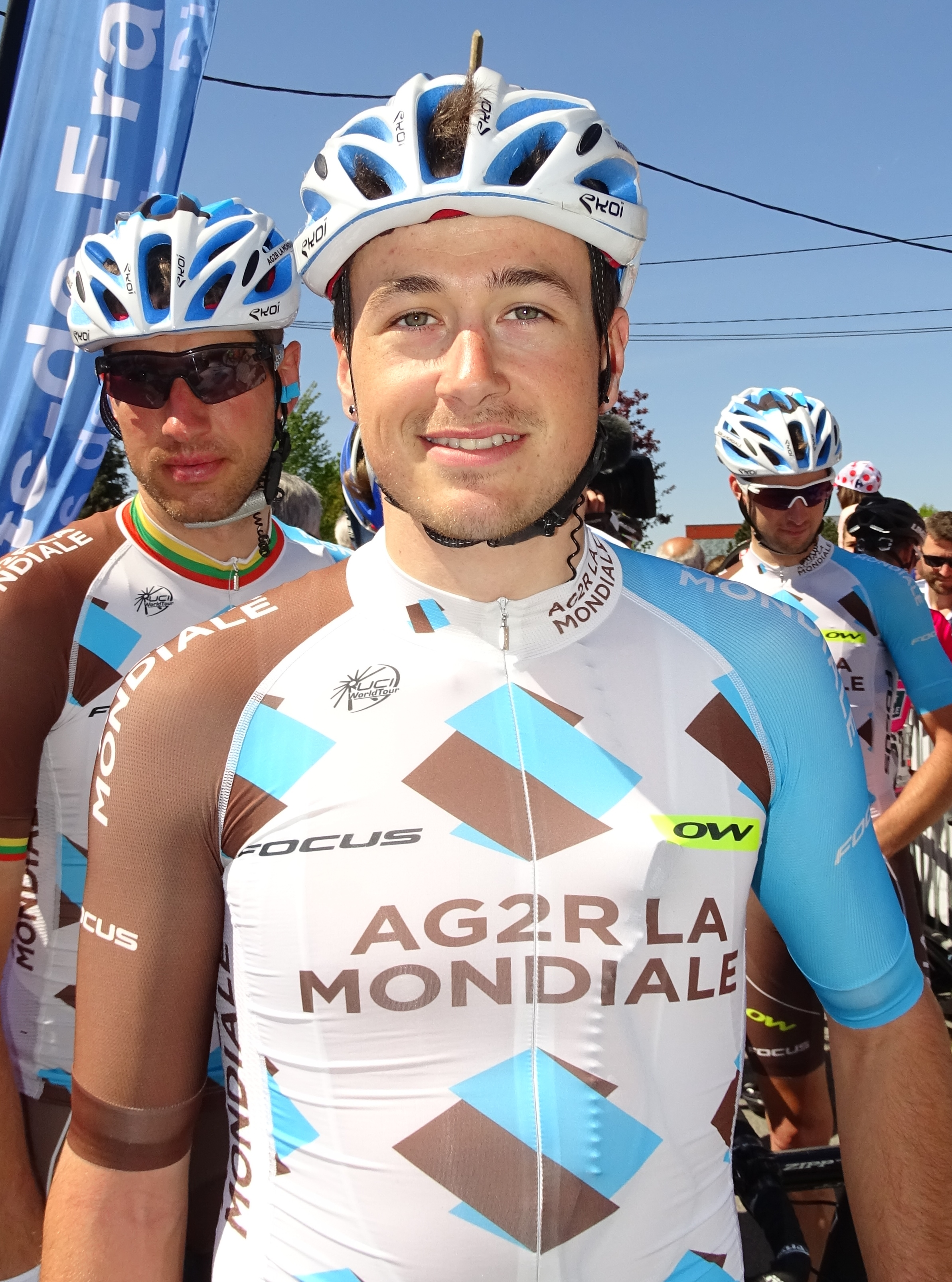 Reportage réalisé le jeudi 5 mai 2016 à l'occasion du départ et de l'arrivée de la deuxième étape des Quatre jours de Dunkerque 2016 à Aniche, Nord, Nord-Pas-de-Calais, France.